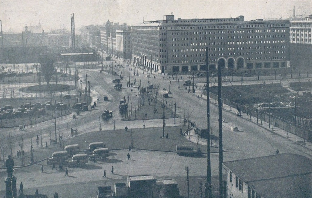 東京駅前 左に東京駅舎